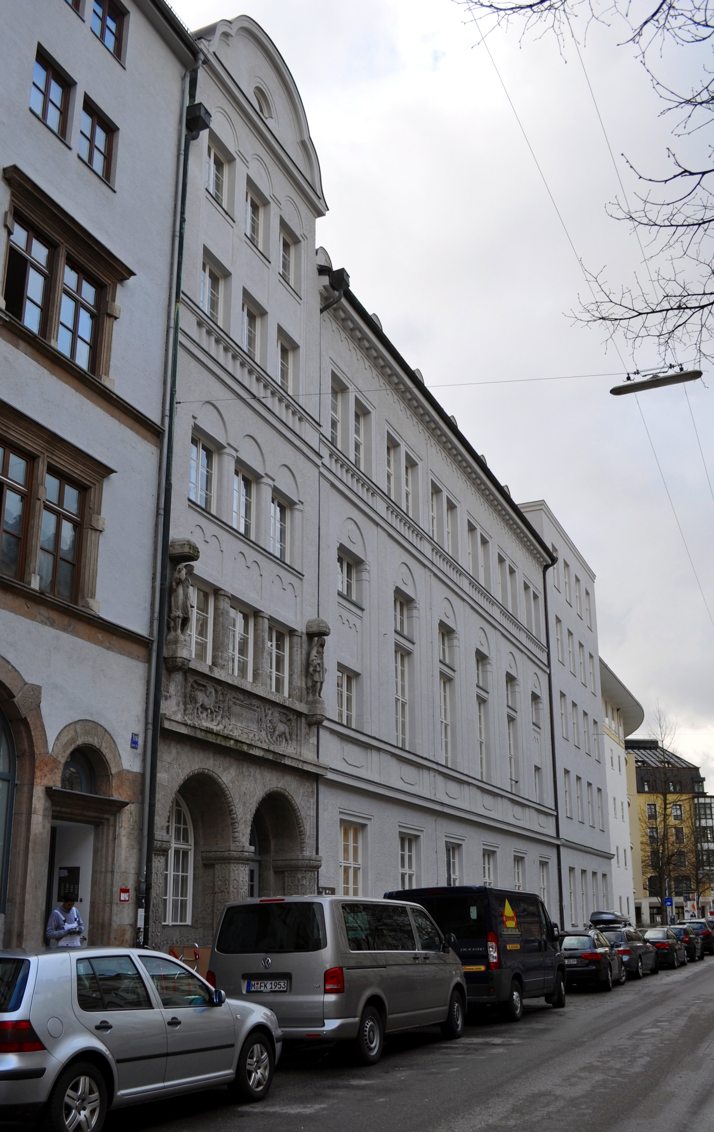 Das St.-Anna-Gymnasium in München-Lehel; Nordfassade